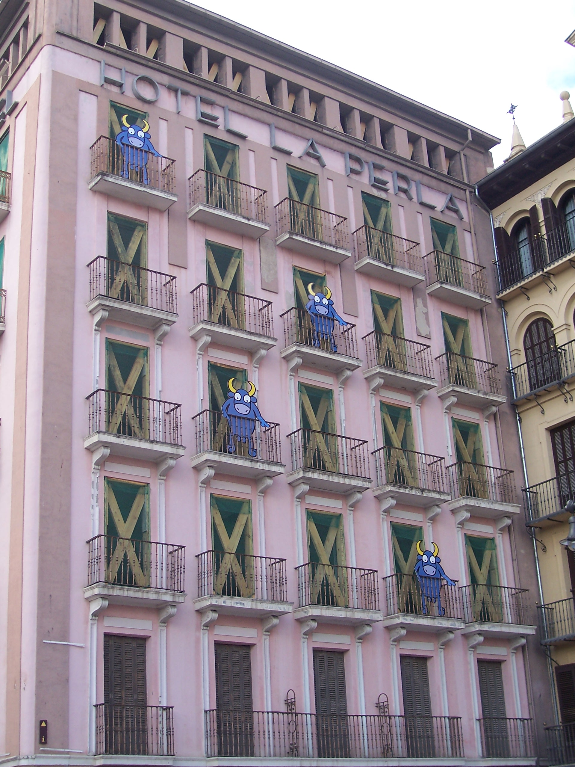 kukuxumusu - pamplona 05